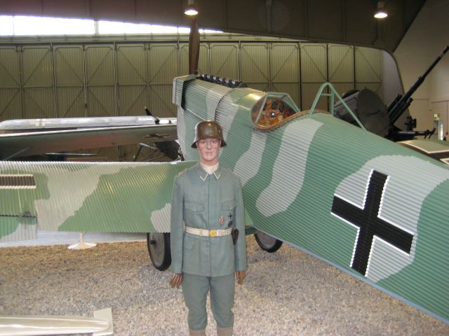 Junkers D.I Werksbezeichnung J 9 Blick Richtung Cockpit